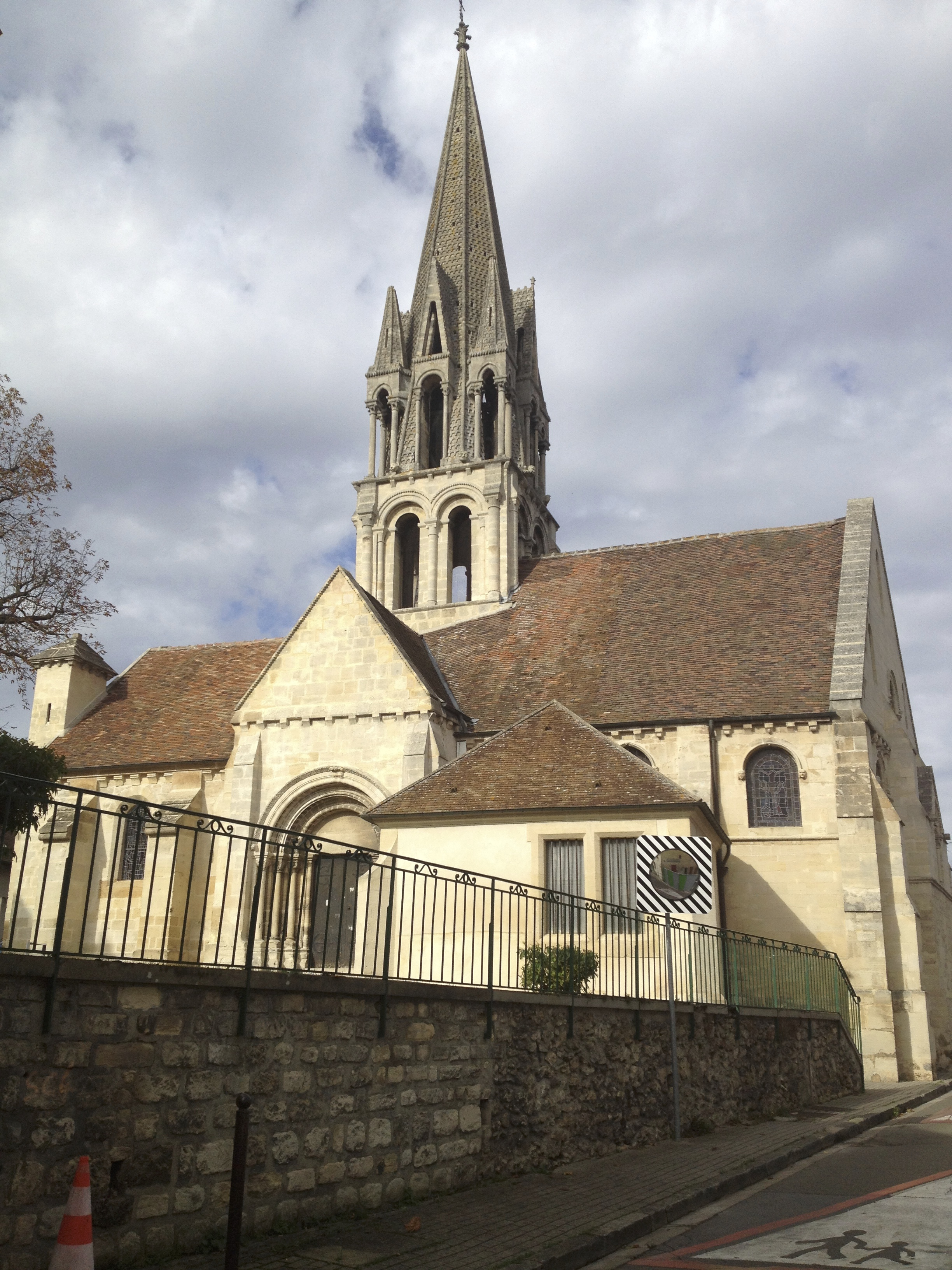 Eglise St Etienne, Vernouillet 78